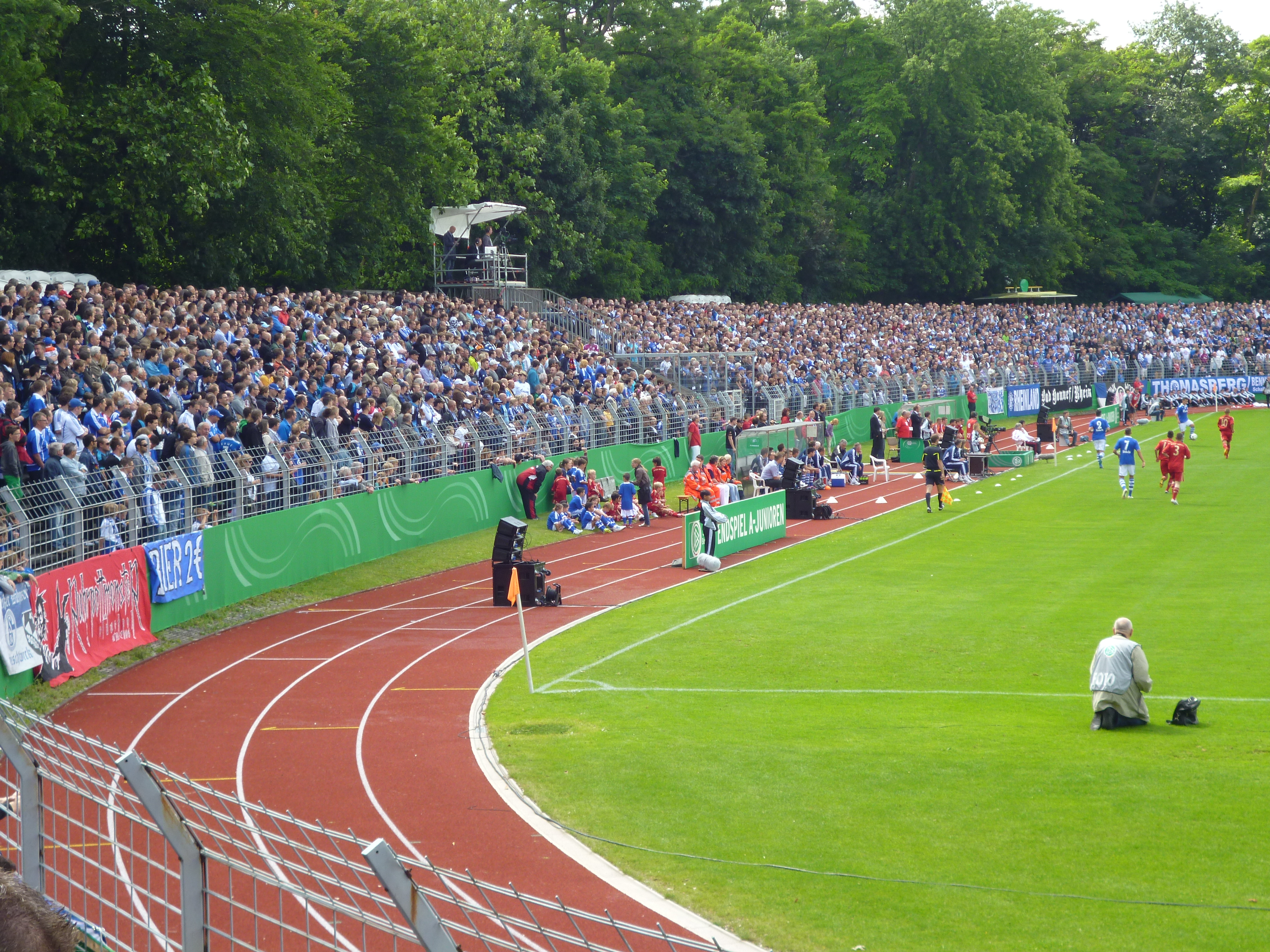 Stimbergstadion, U19-Finale